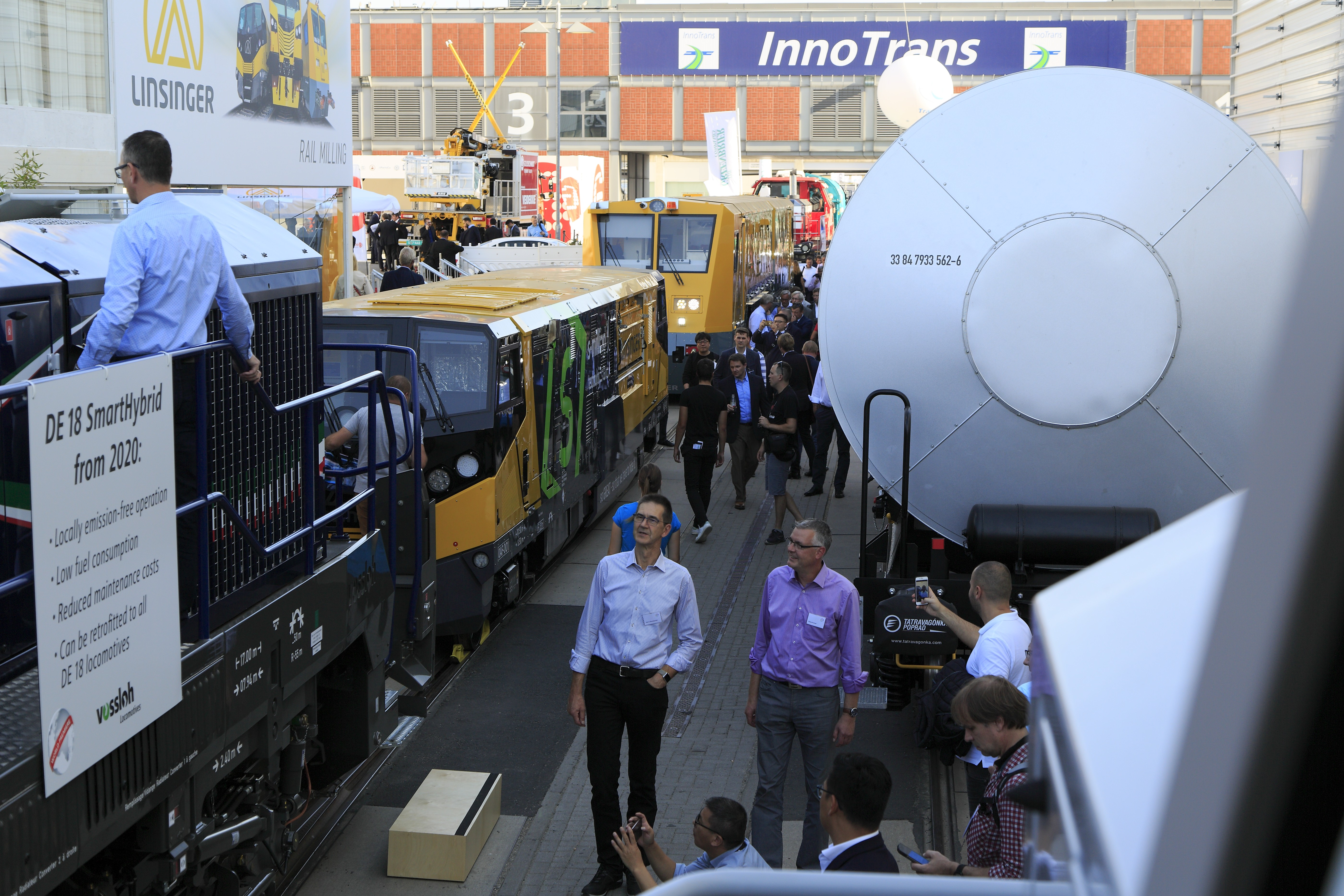 Am ersten Messetag, Fotografen haben es unter diesen Verhältnissen schwer.